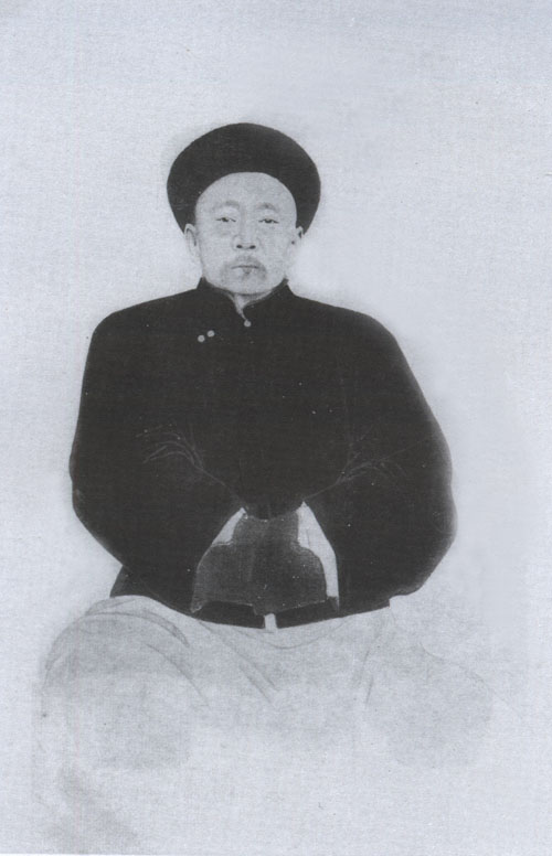 清代武职官吏。世袭男爵，充头等侍卫，官至西安将军，武昌起义时，抵抗西安新军，兵败自尽。